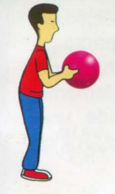 Colocación.